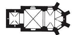 Grundriss der Kapelle auf dem Fürstenberg (Gemeinde Ense)